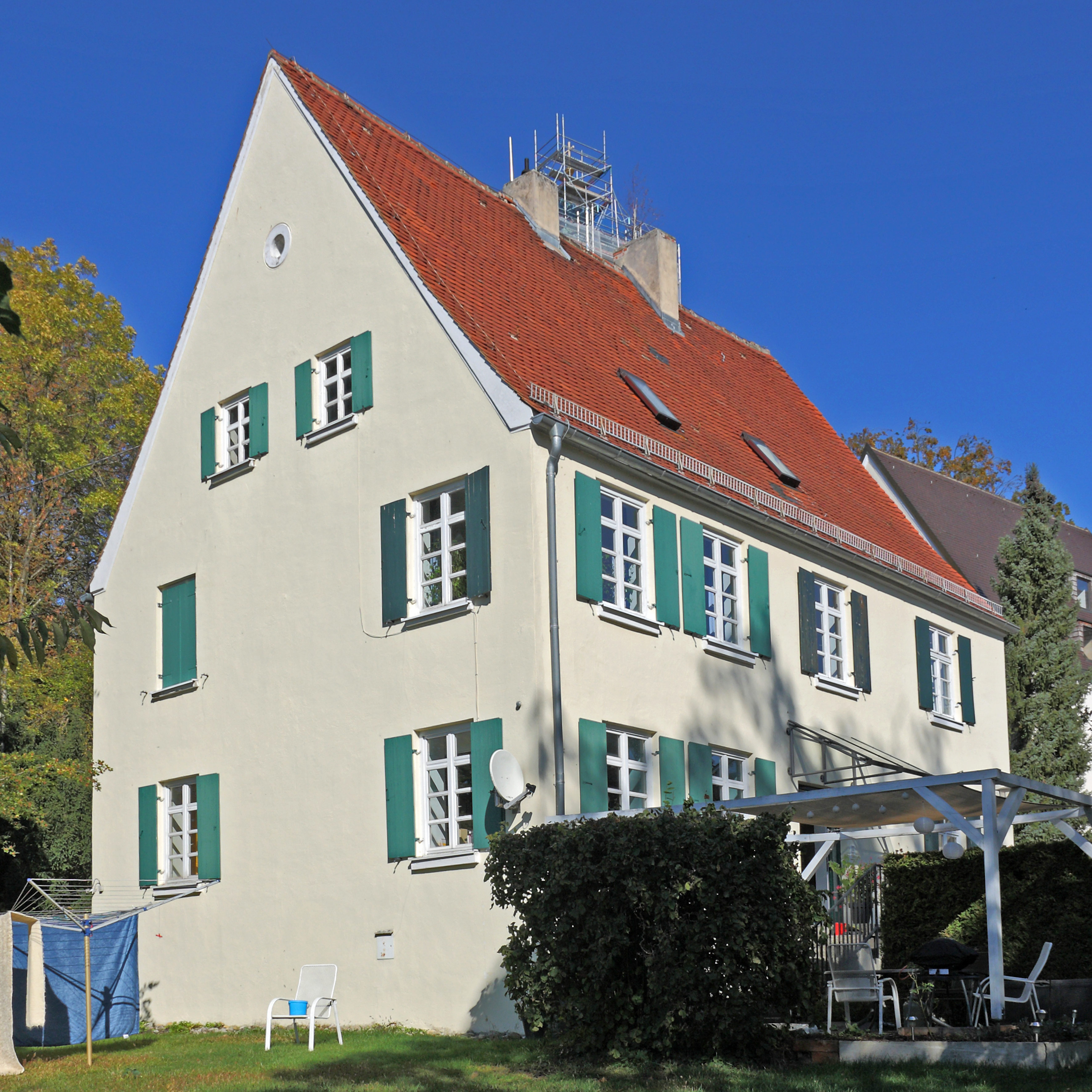 Burtenbach, Kirchberg 2; ev. luth. Pfarrhaus, erbaut im 17./18. Jh.